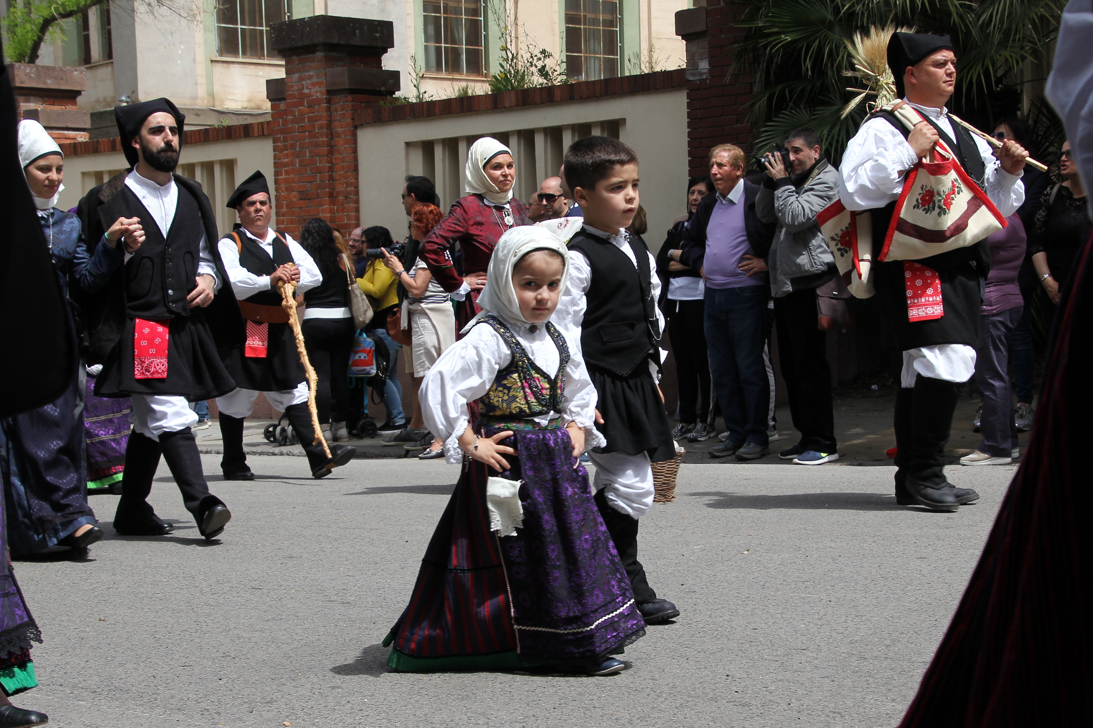 Costume tradizionale